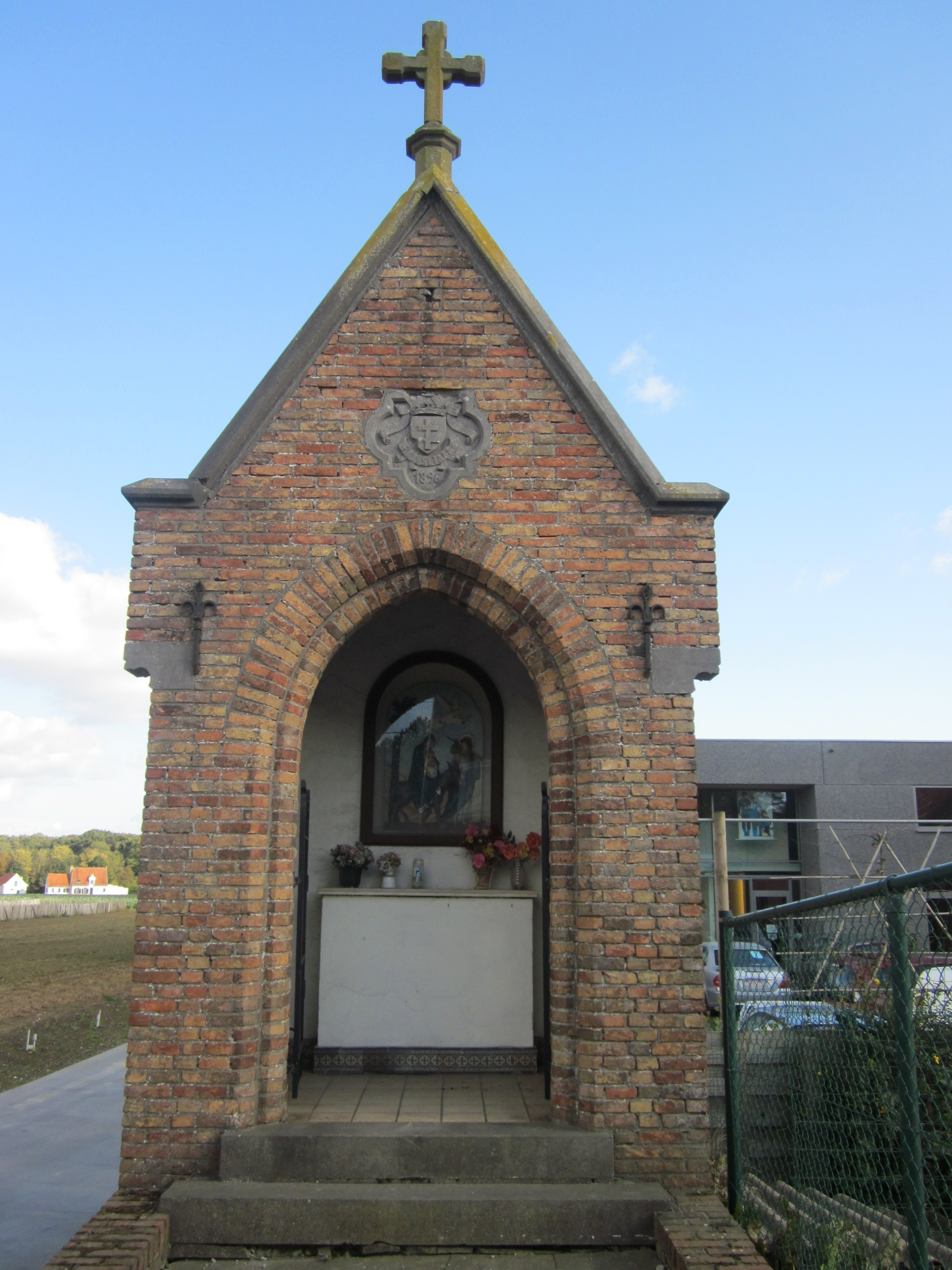 Ommegangkapel (1896), Ommegang Oost nr. 12, Westrozebeke 31″ N, 3° 00′ 57.85″ E